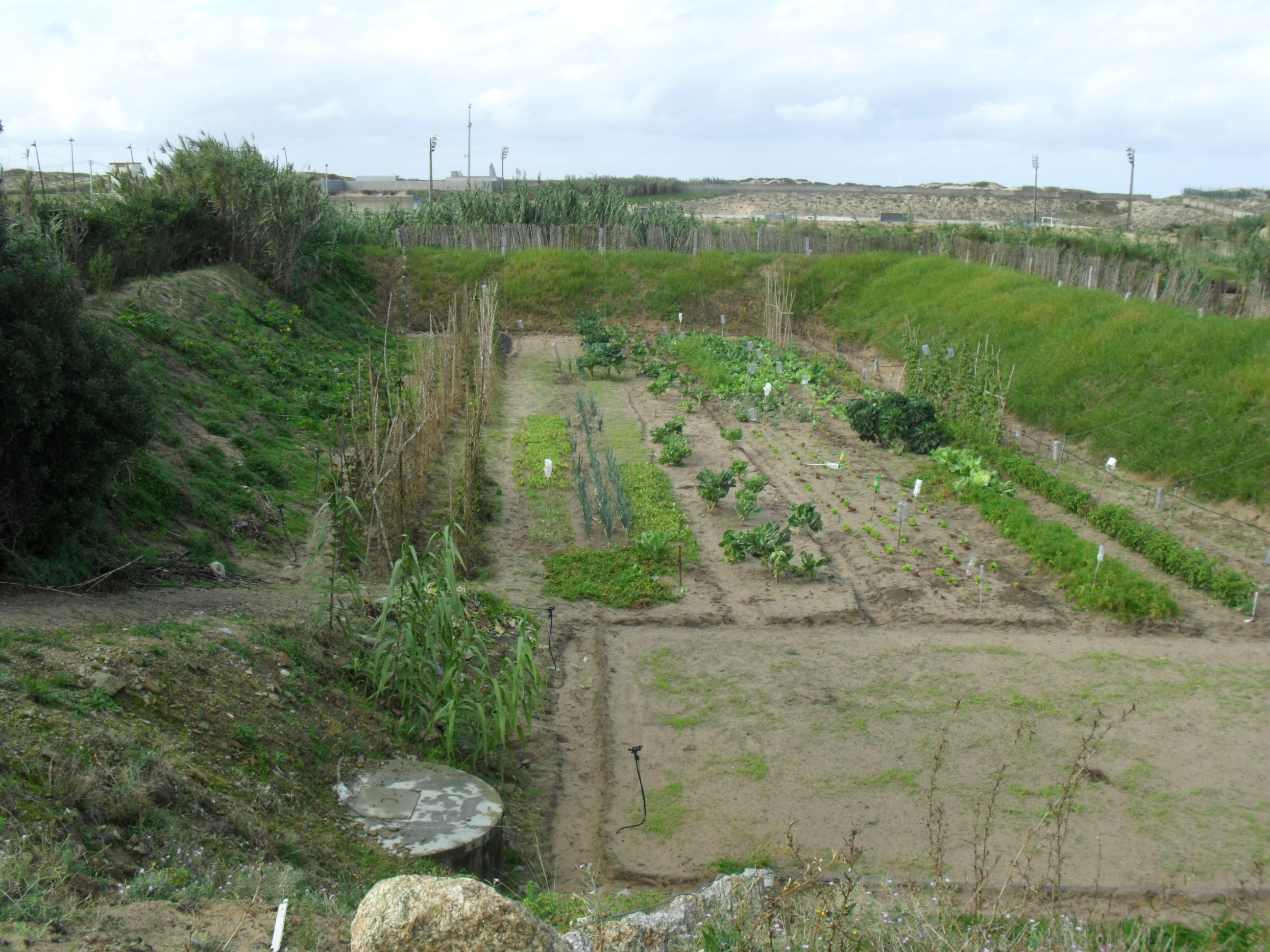 Campo masseira do Rio Alto, setembro 2012.